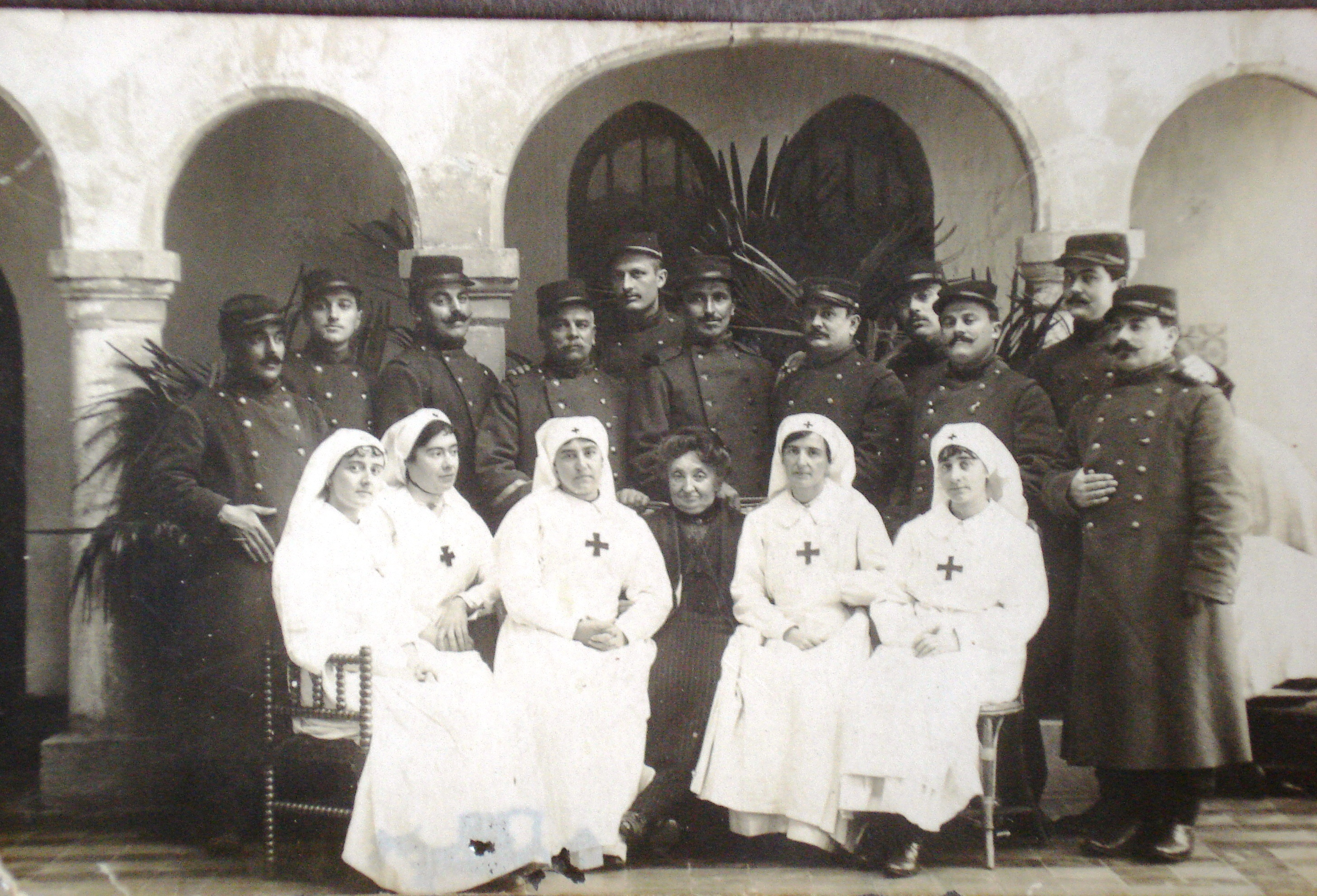 La Mauresque pendant la guerre de 14 18